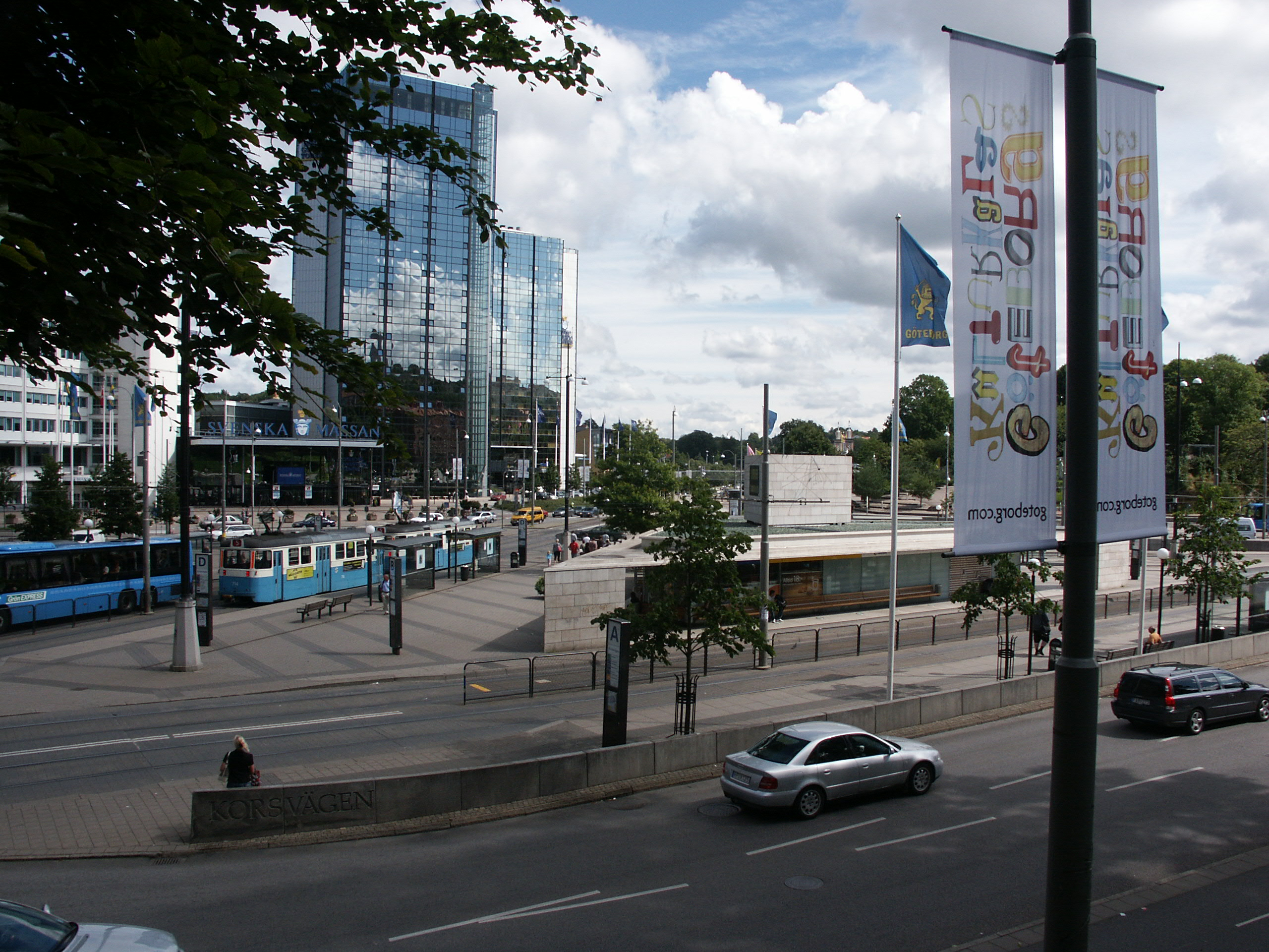 Korsvägen, Göteborg, Sweden